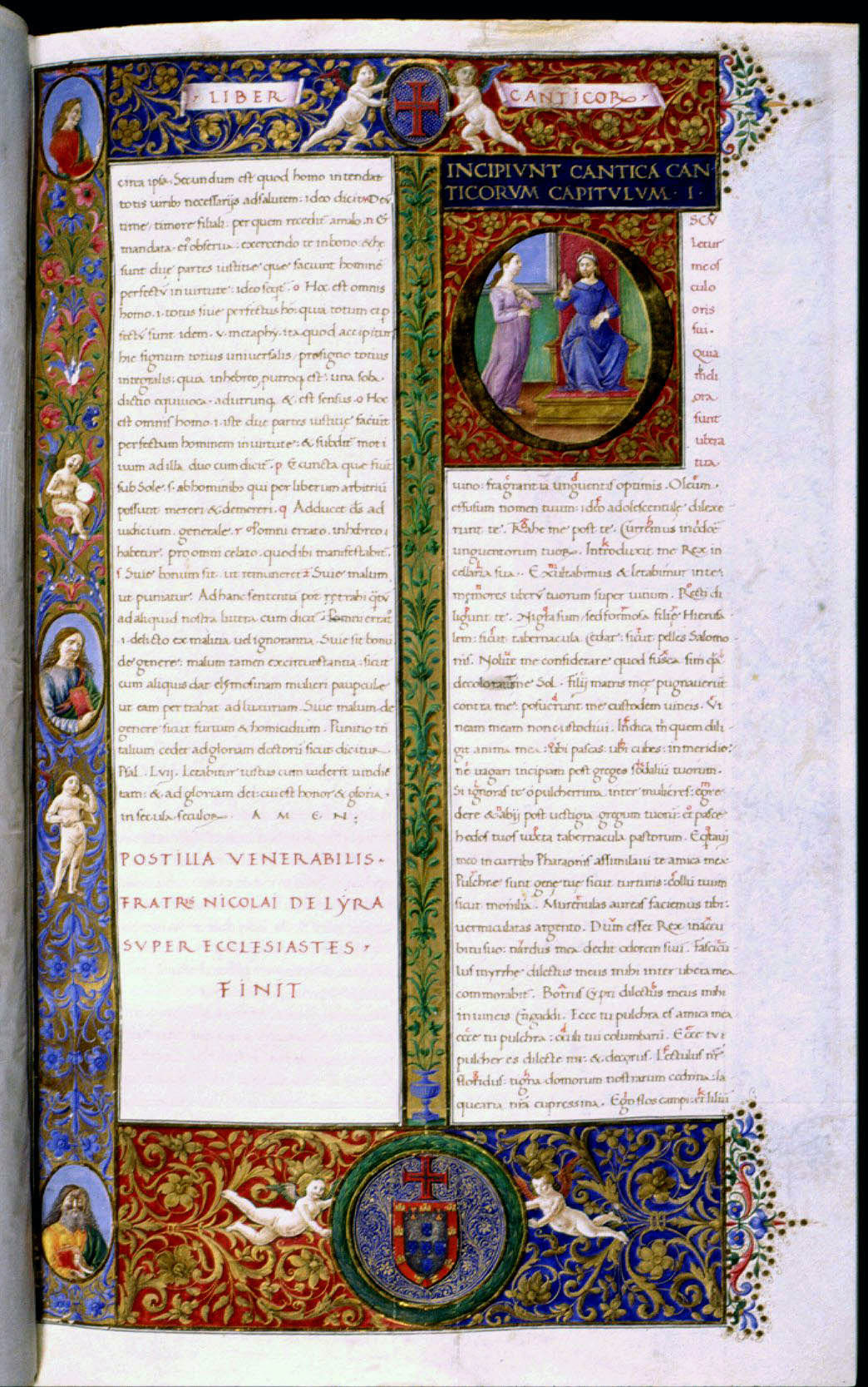 Bíblia dos Jerónimos, página do Vol. IV